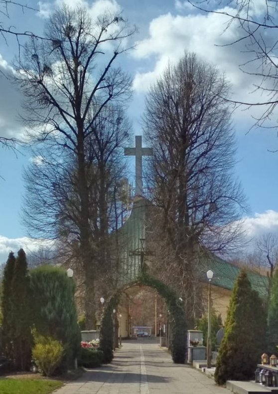 Cmentarz Ducha Świętego we Wrocławiu - 2020.03.30